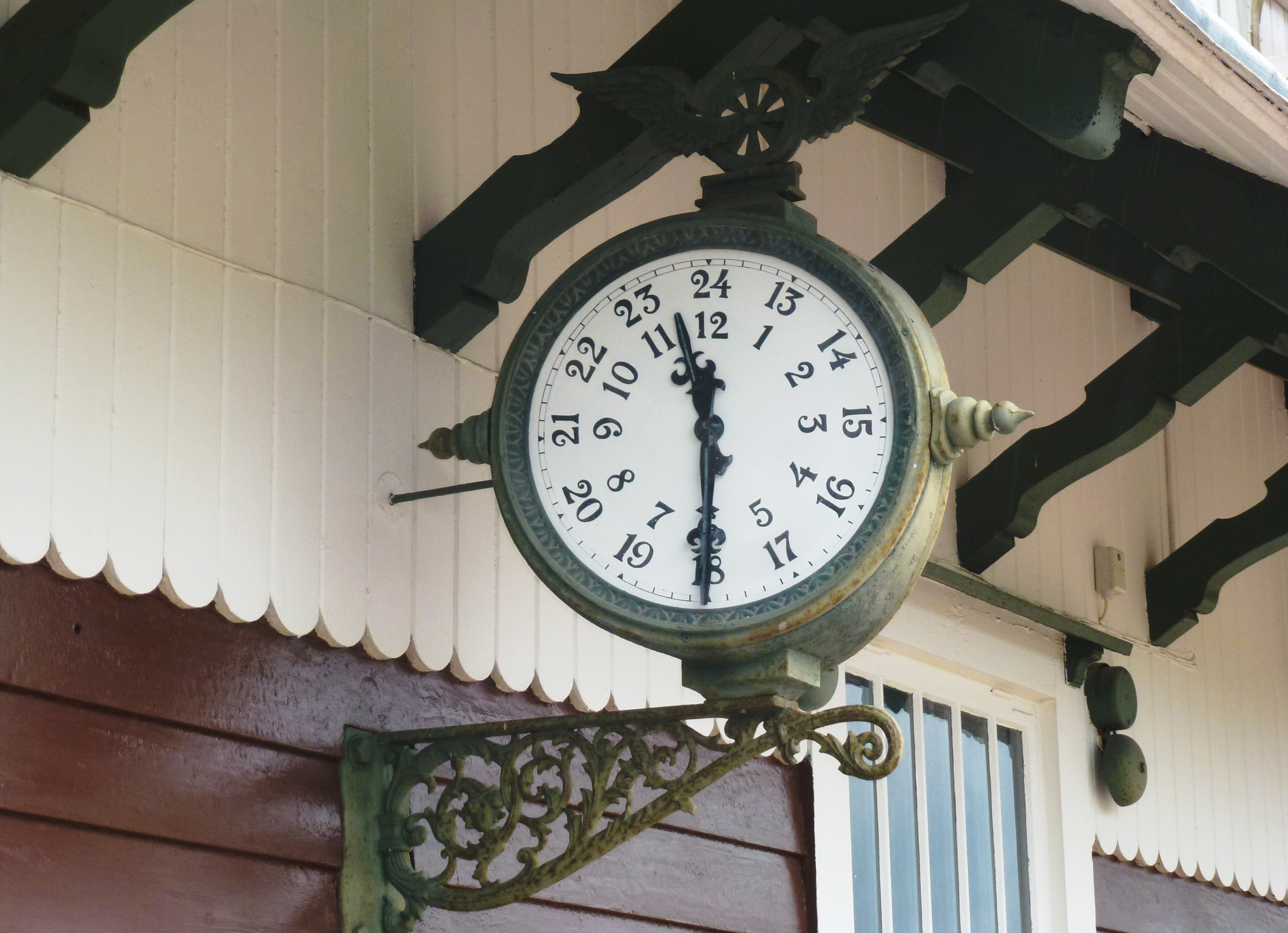 Stockholm–Västerås–Bergslagens Järnvägar Björbo, stationsklocka